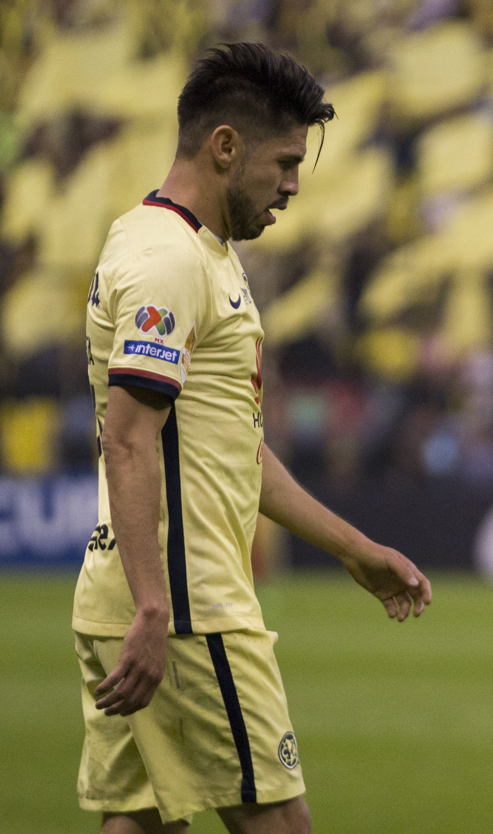 Final CONCACAF 2016